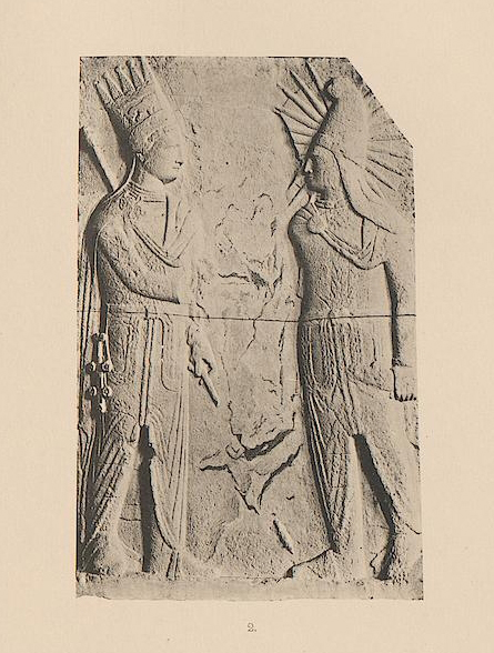 Rekonstruktion des Dexiosisreliefs mit Antiochos und Apollo-Mithras-Helios-Hermes auf der Westterrasse am Nemrut Dağı, Türkei, von Carl Humann und Otto Puchstein, 1890.